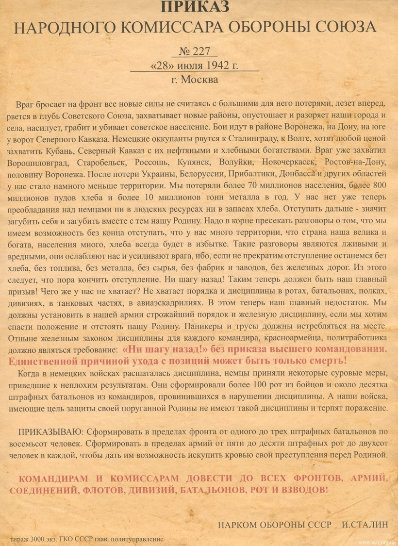 Приказ № 227 "Ни шагу назад!" изданный 28 июля 1942 года и сыгравший важную роль в Великой Отечественной войне и особенно в Сталинградской битве